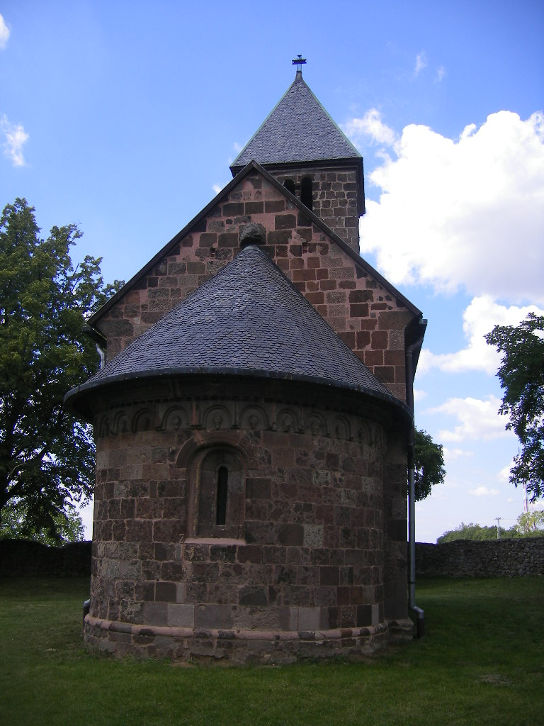 Nagybörzsöny - Szent István templom This is a photo of a monument in Hungary. Identifier: 7140